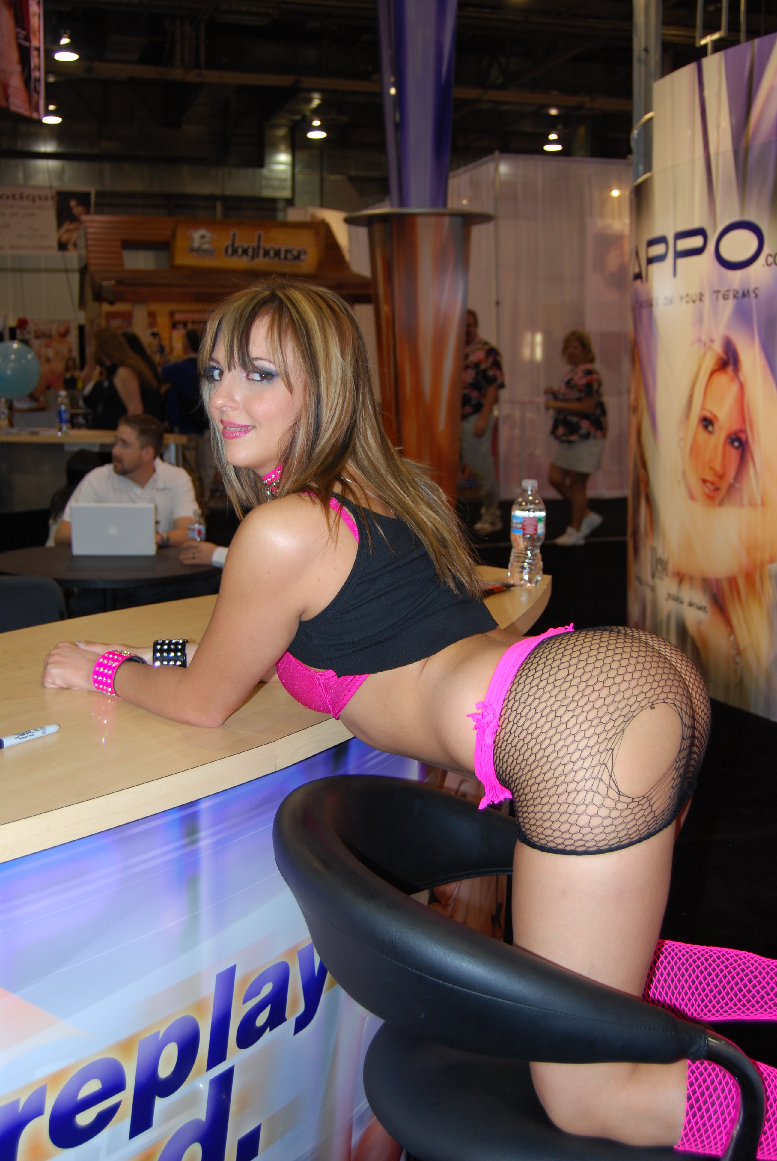 AEE2008_Nikon_Day2 071